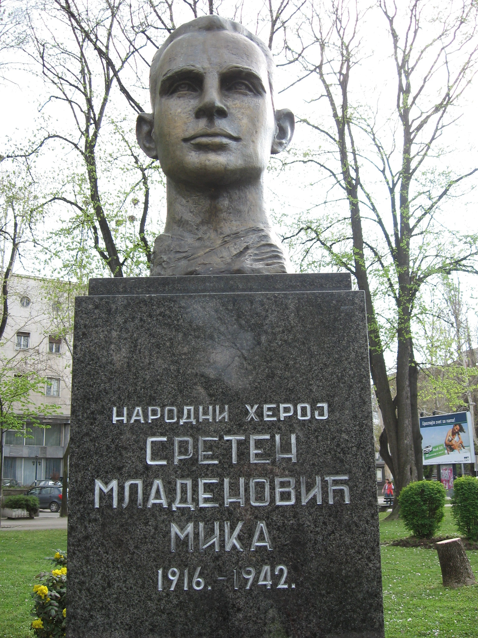 Bista Sretena Mladenovica Mike. Snimljeno u aprilu 2010.